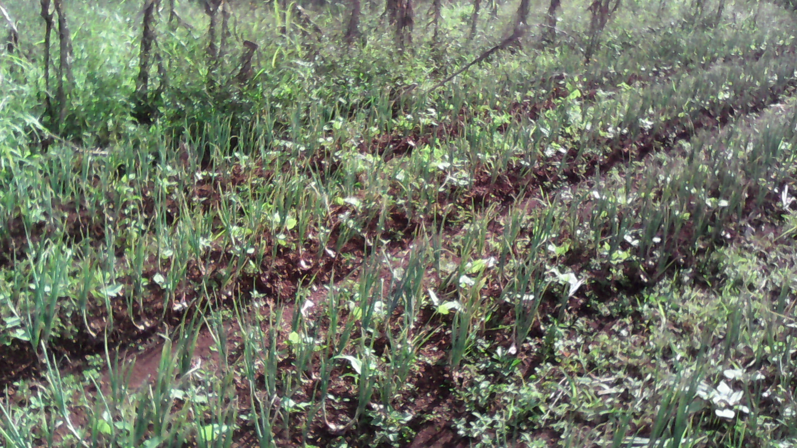 Images from Wiki Loves Africa 2014